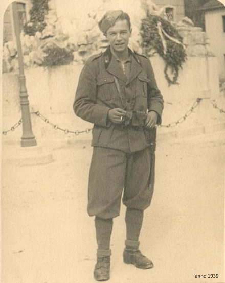 Conz militare nel 1939